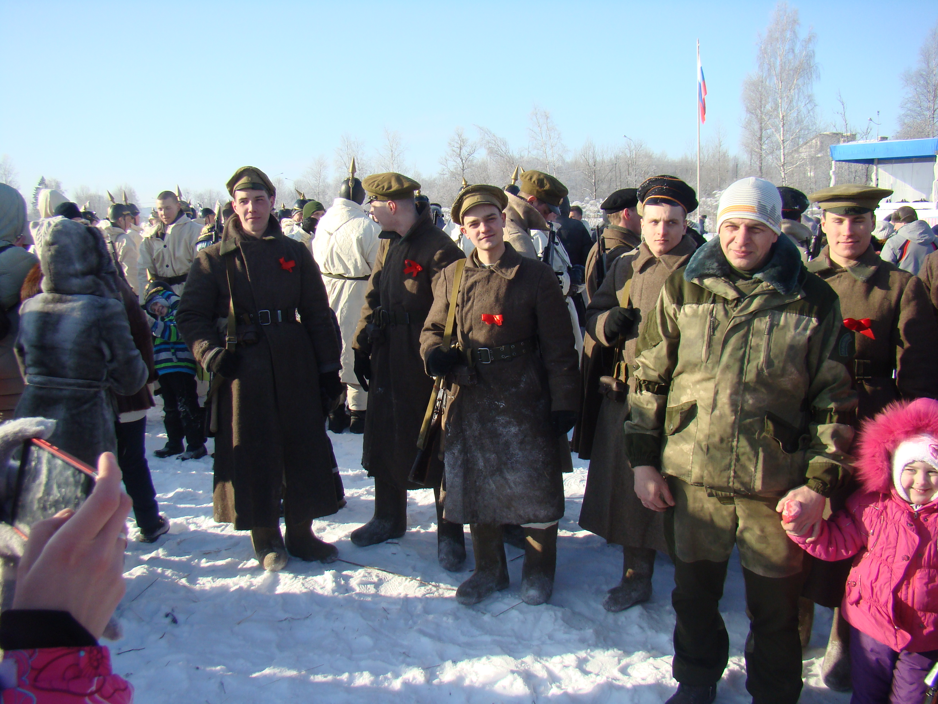 Участники реконструкции боя под Псковом в феврале 1918 года. Кресты (Псков)